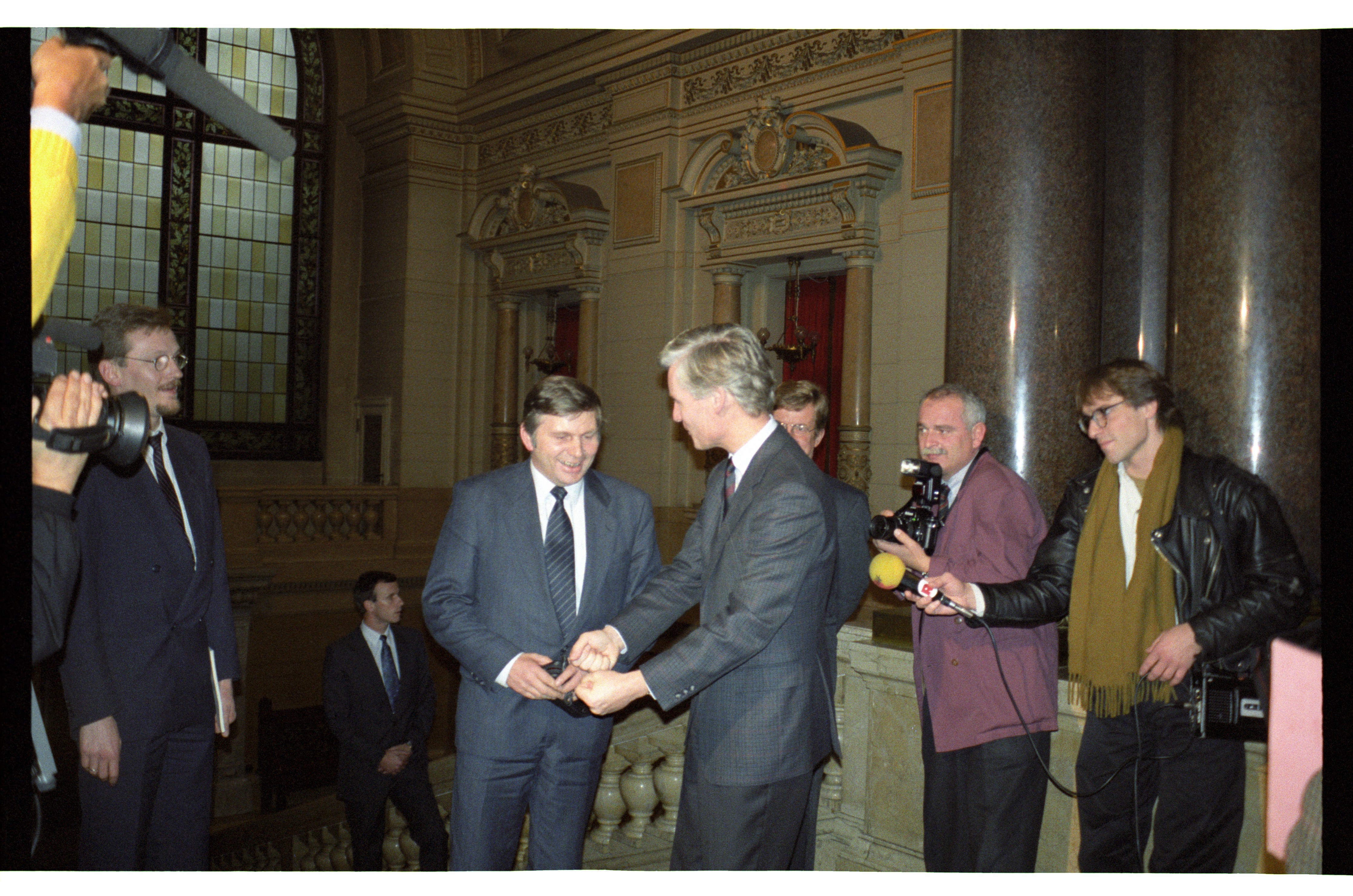 Ministerpräsident Alfred Gomoka bei Antrittsbesuch bei Hamburgs Erstem Bürgermeister Henning Voscherau